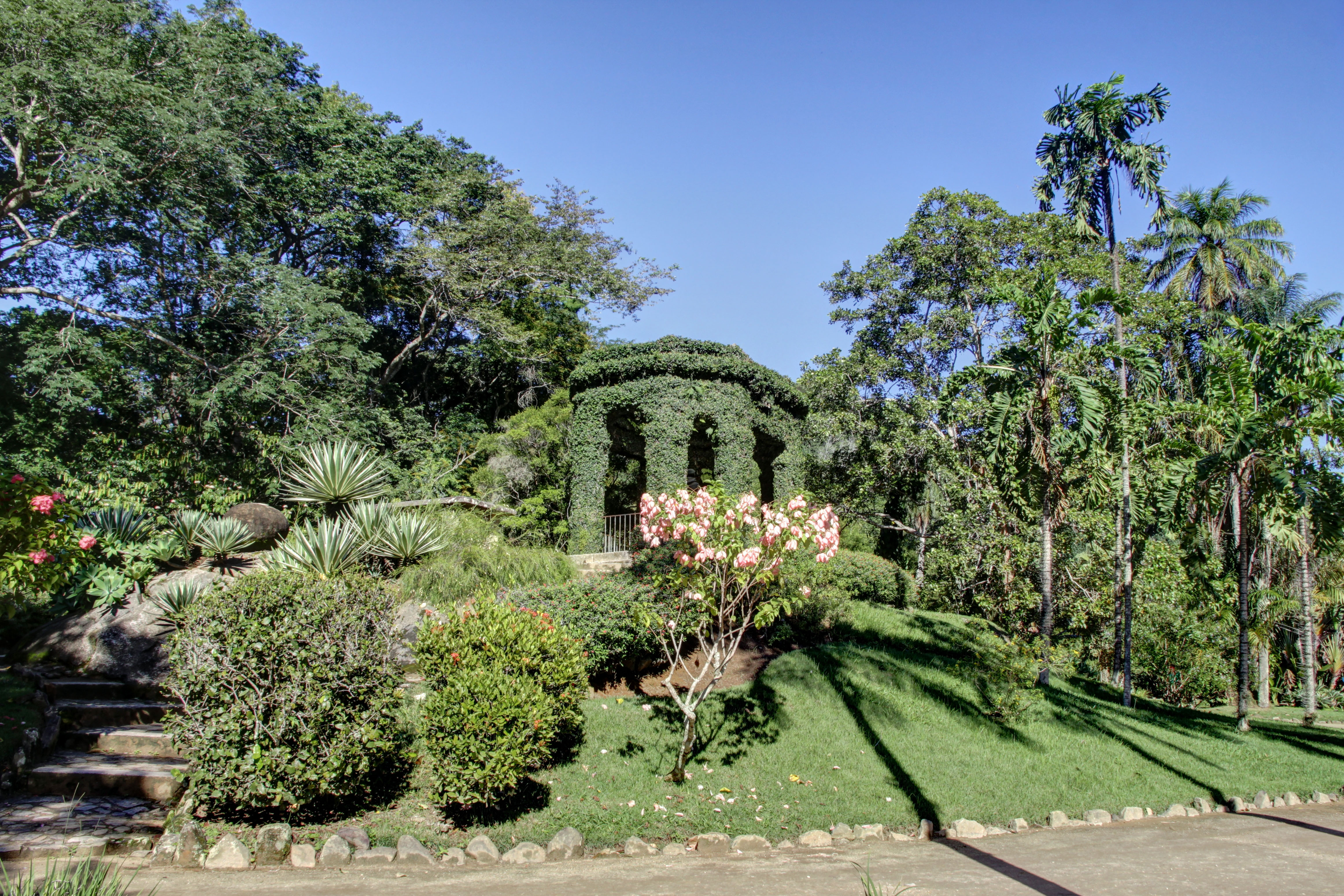 Cômoro Frei Leandro no Jardim Botânico do Rio de Janeiro.